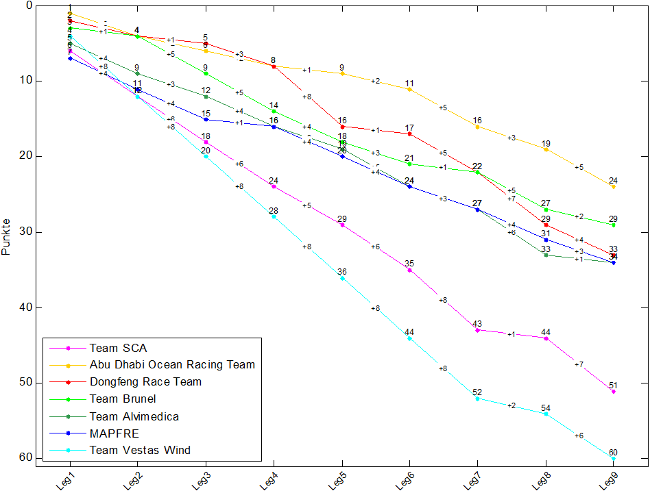 Volvo Ocean Race 2014-2015 Overall Scores